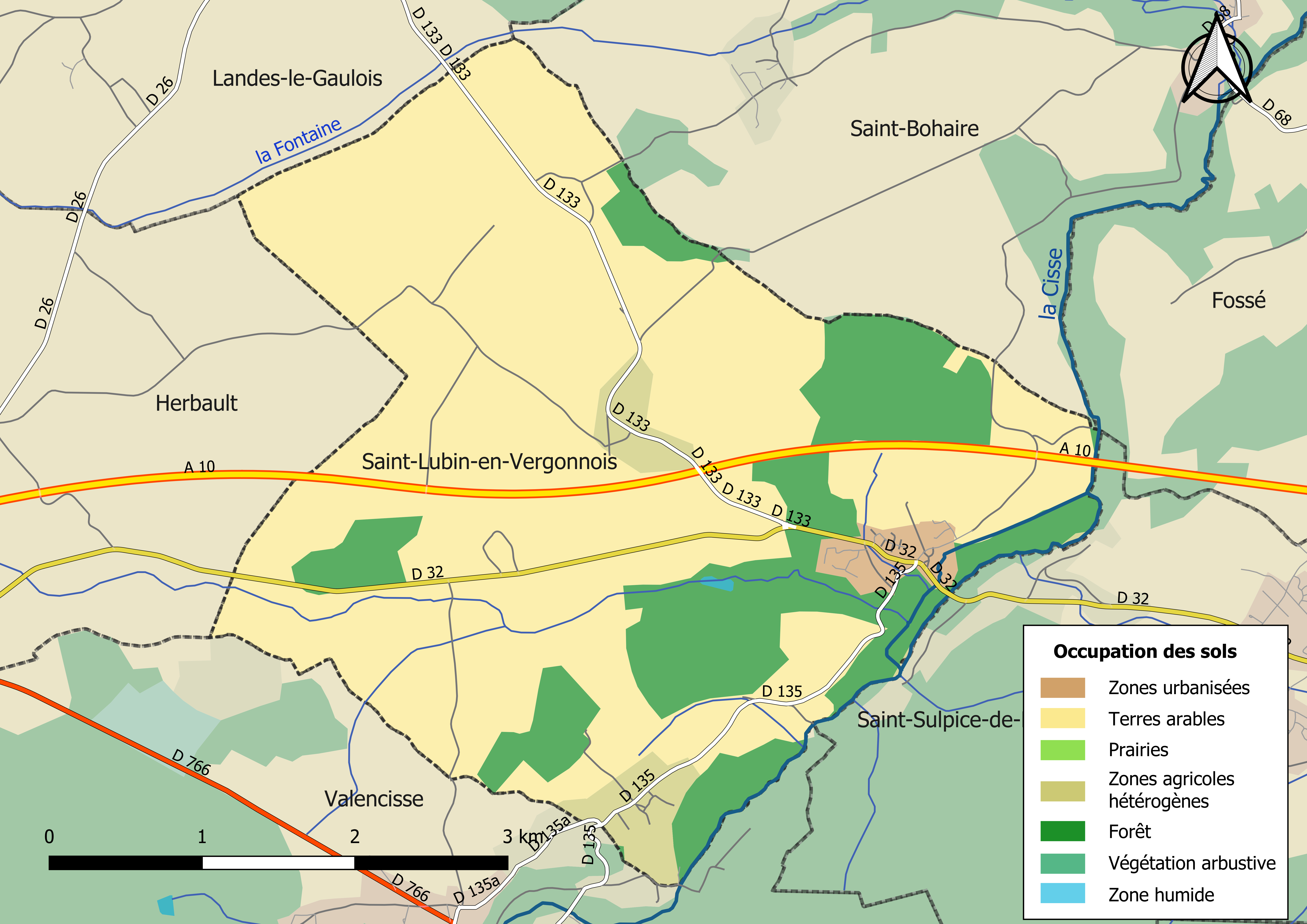 Carte des infrastructures et de l’occupation des sols en 2018 de la commune de Saint-Lubin-en-Vergonnois (France).